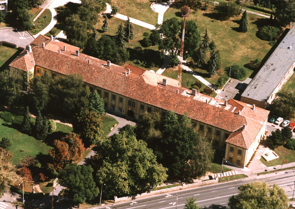 Palace - Kapuvár - Hungary - Europe (Eszterházy Mansion) - -Esterházy-kastély; múzeum. barokk, 1750 körül. Átalakítva. azonosító 4482 (törzsszám 3692)